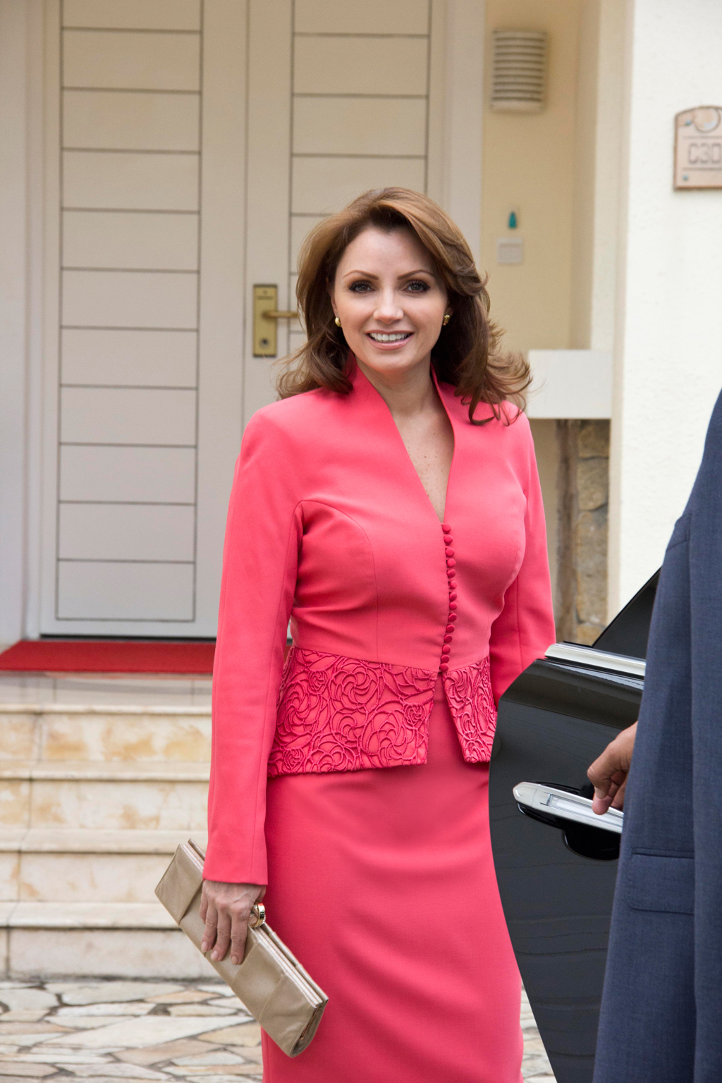 Camino a la reunión con con el Presidente de la República Popular China, el Excmo. Sr. Xi Jinping. Boao , República Popular China. 7 de abril de 2013.